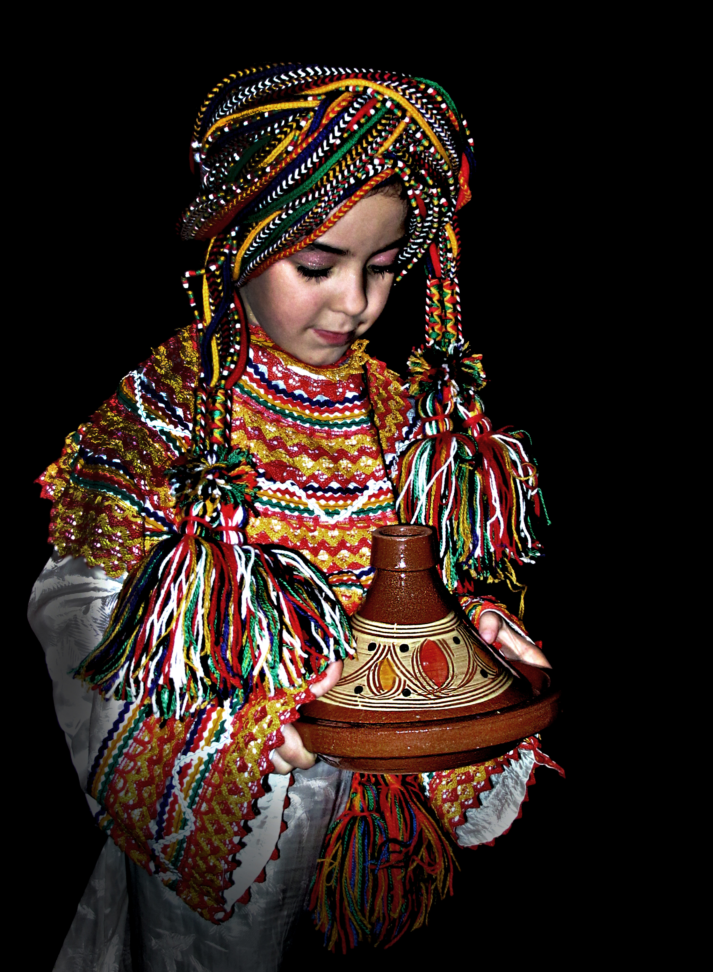 une fille Berber avec tenu traditionnelle portant un ustensile de cuisine traditionnel qu'on appelle TADJINE. This is an image of food from Algeria